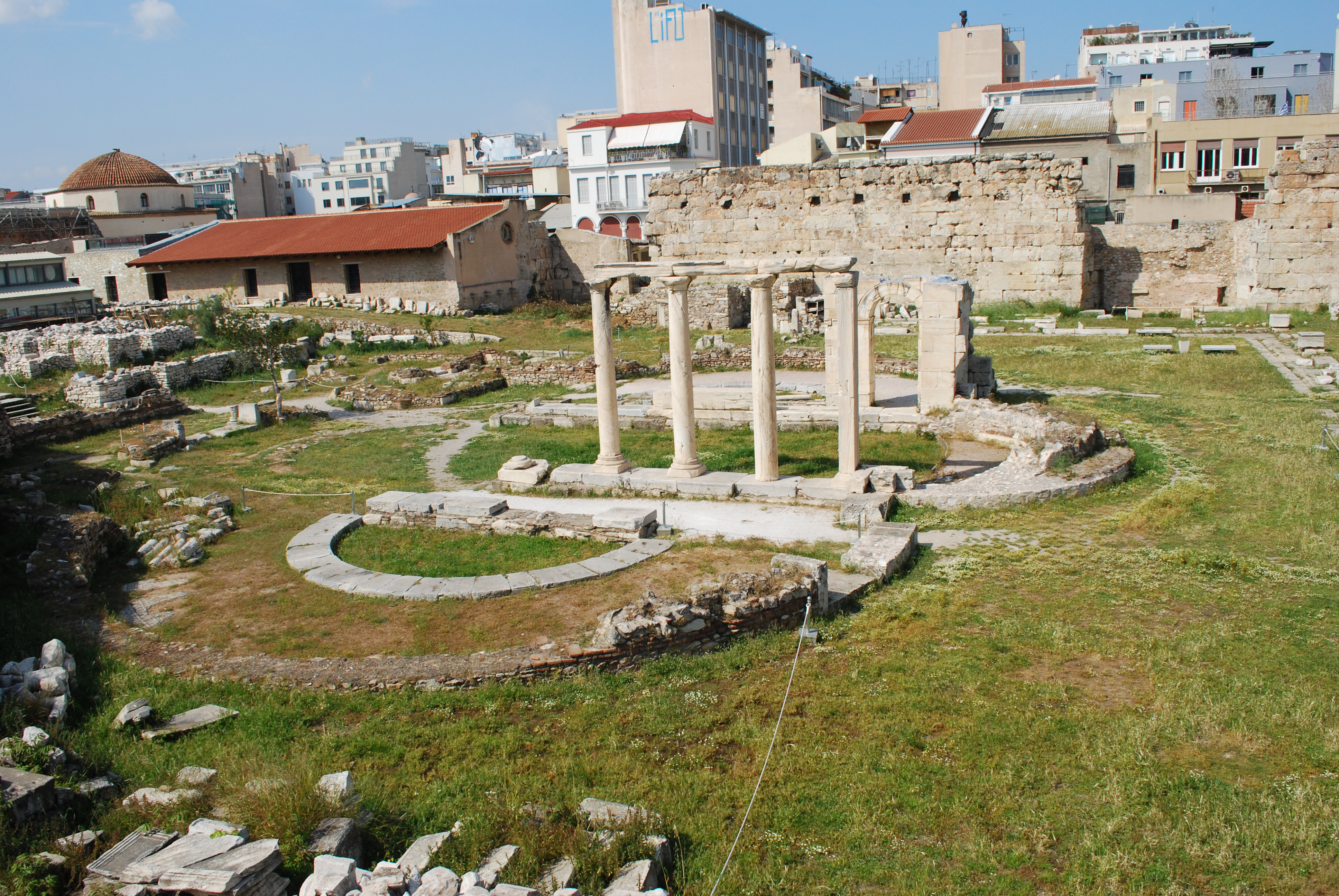 Athènes : la Bibliothèque d'Hadrien.